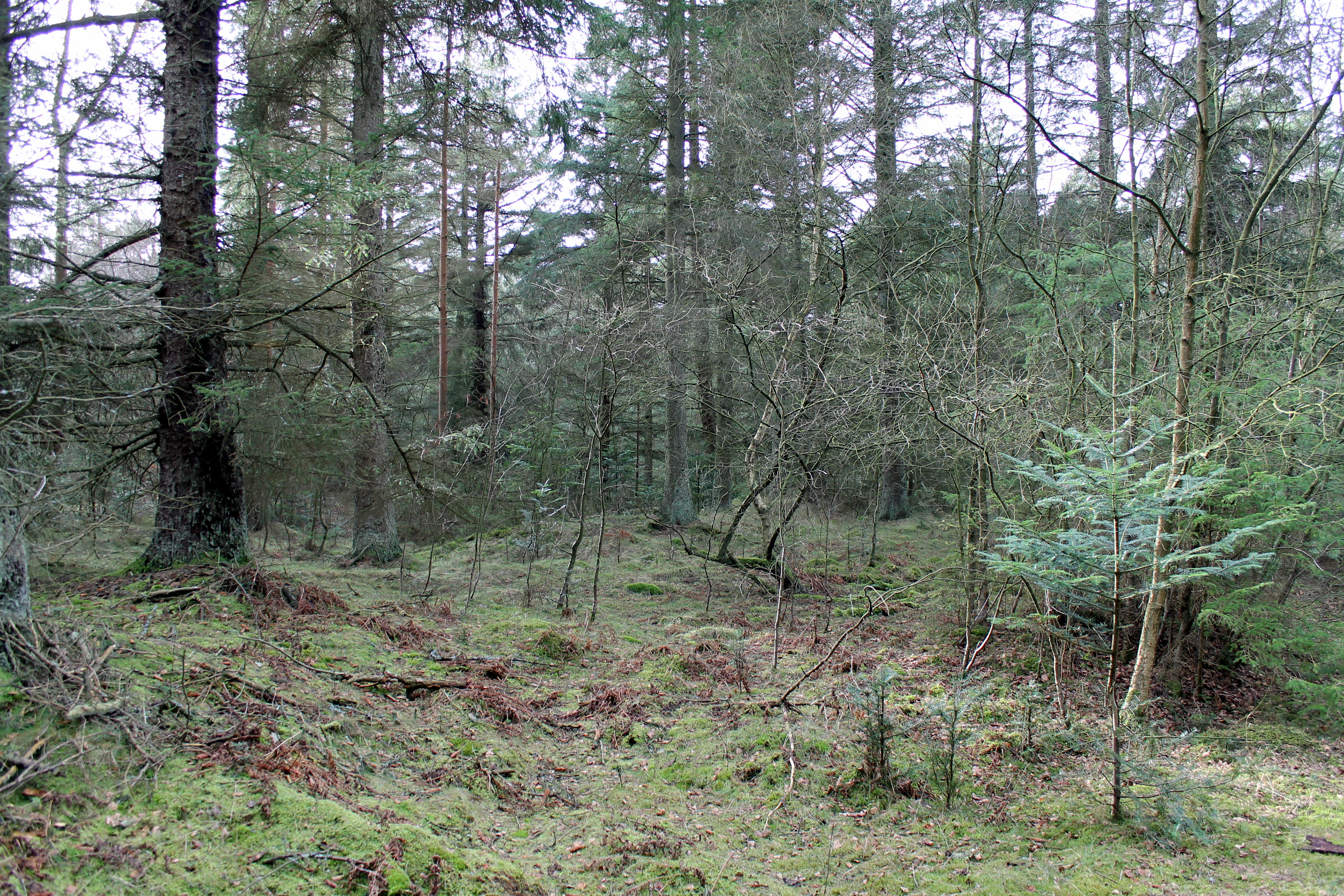 Uggerby Klitplantage. EU-habitatområde nr. 5